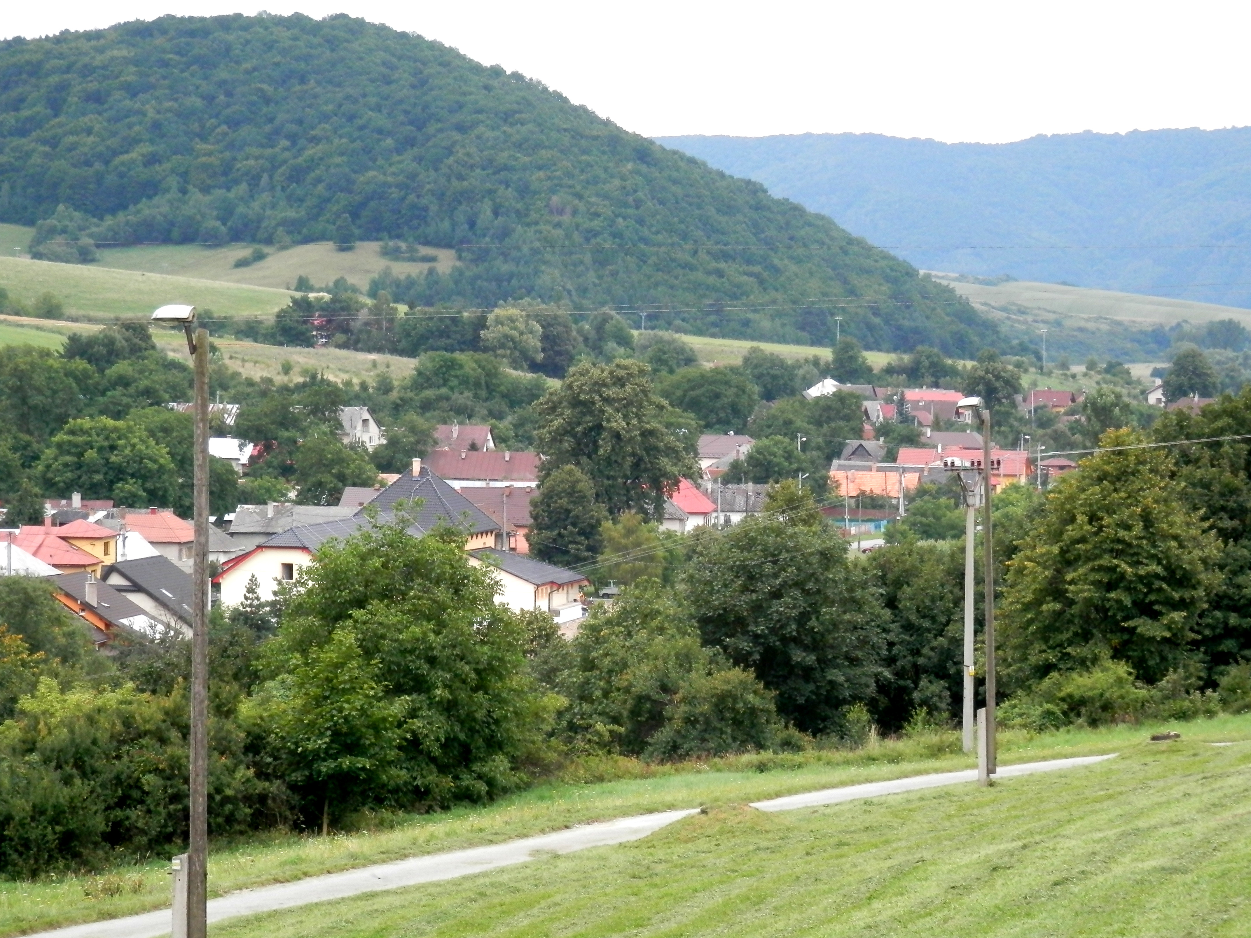 Obec Ľutina okres Sabinov.